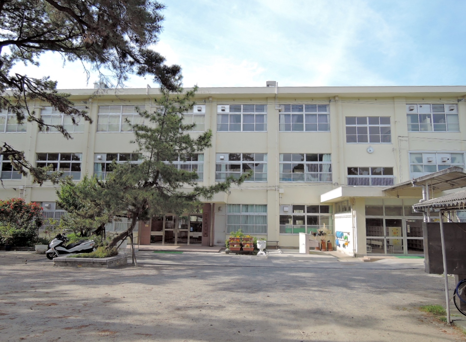 福岡市早良区の福岡市立百道小学校